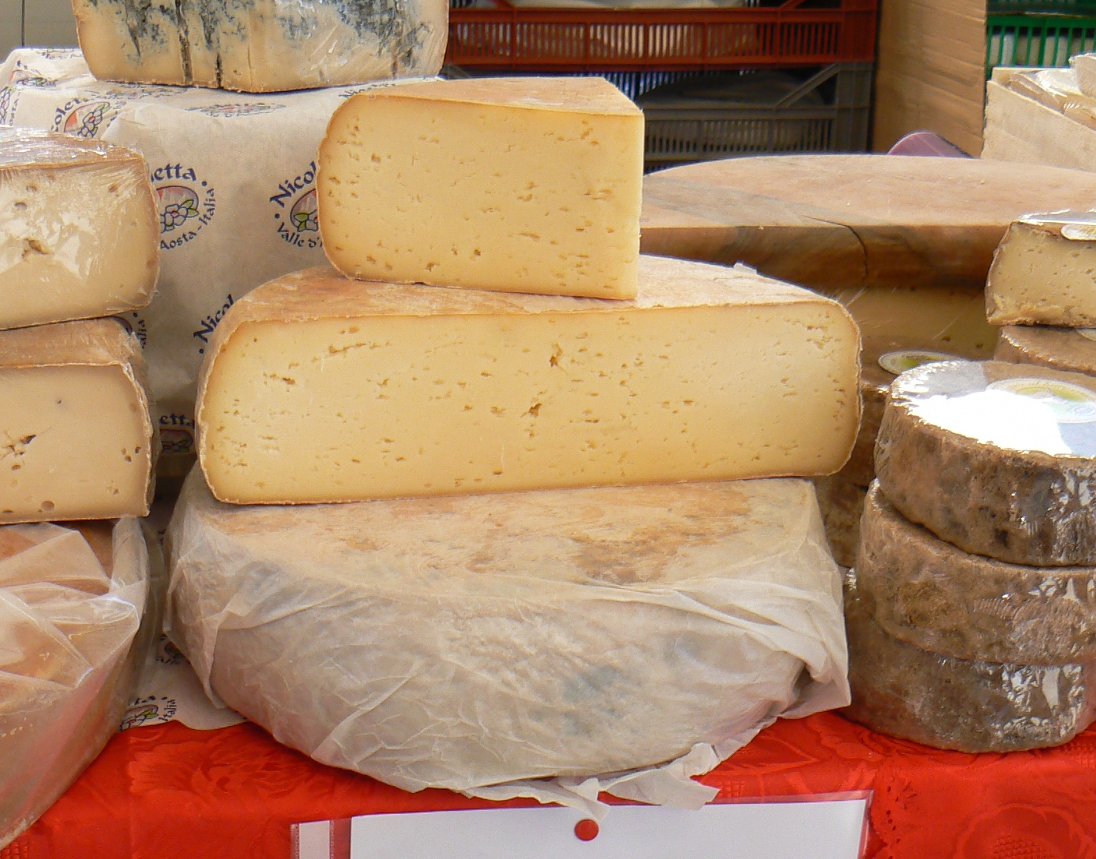 Toma di Gressoney, fotografata alla Fiera di Sant'Orso di Donnas. Donnas, Valle d'Aosta, Italia.